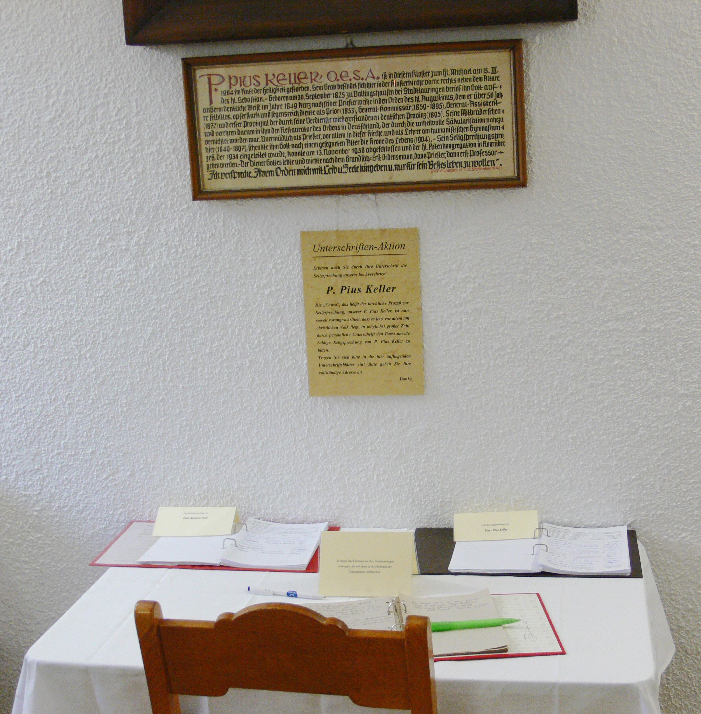 Münnerstadt Alte Aula, Vorraum zur Augustinerkirche, Unterschriftensammlung zur Förderung der Seligsprechung von P. Pius Keller